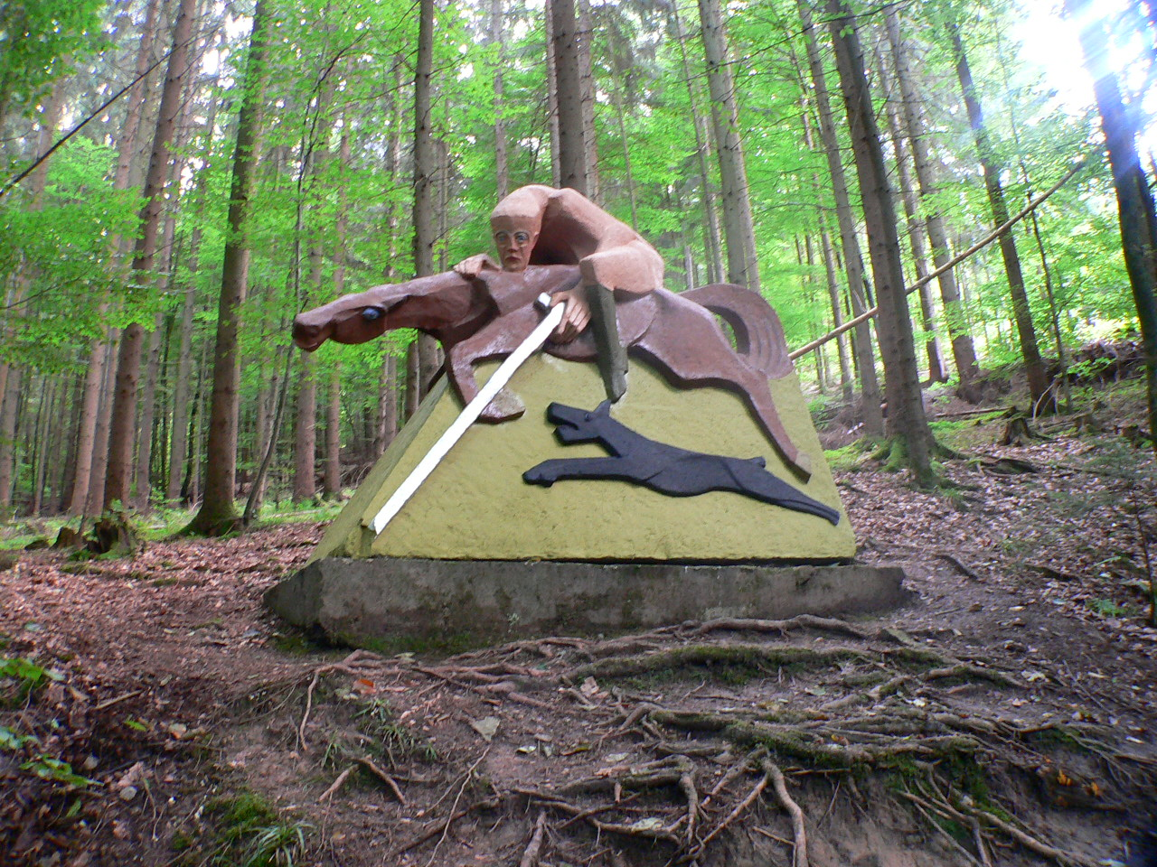 "Wilder Reiter" in der Obrunnschlucht bei Höchst im Odenwald